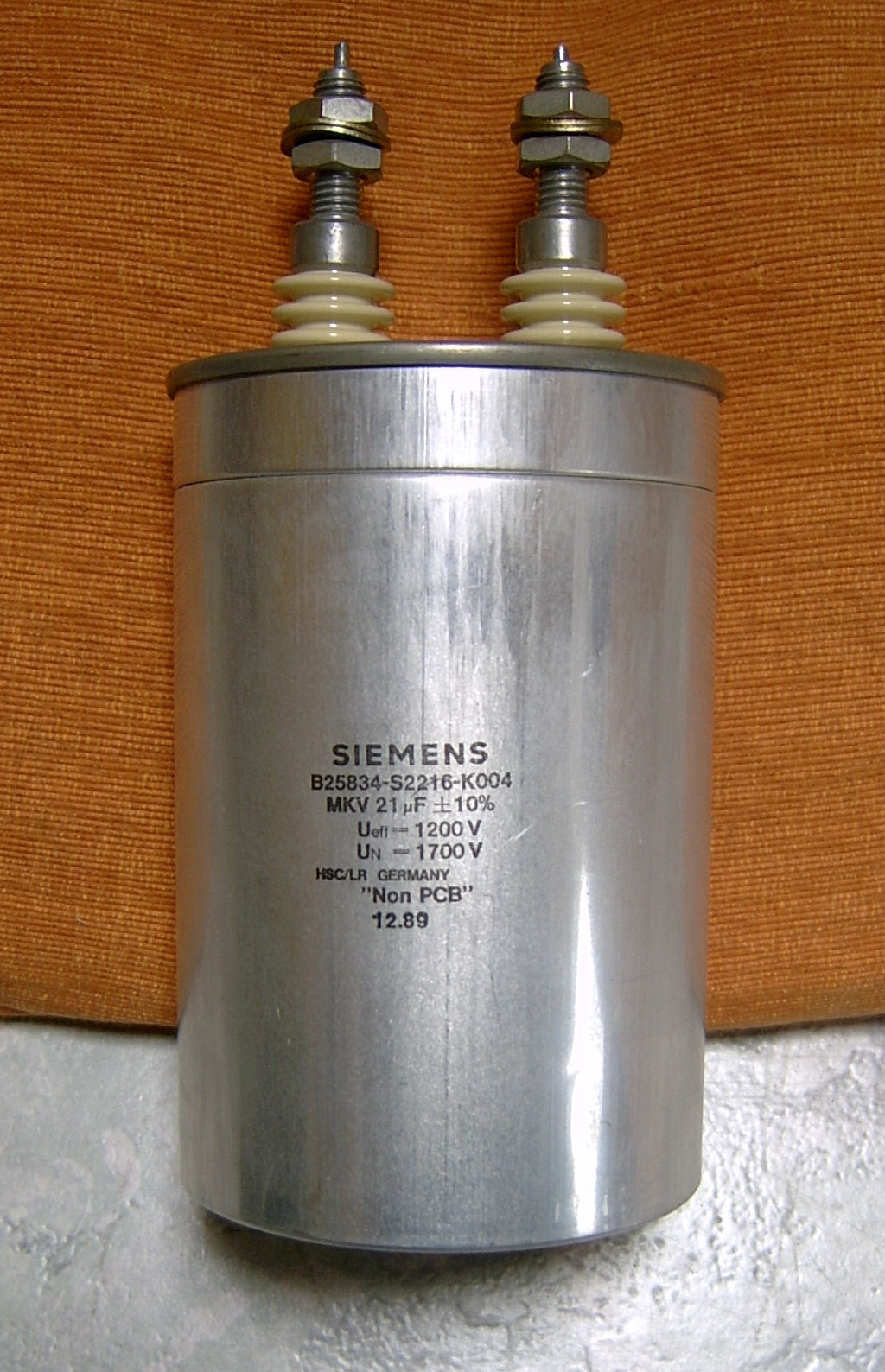 Leistungskondensator mit 21µF für 1200V.